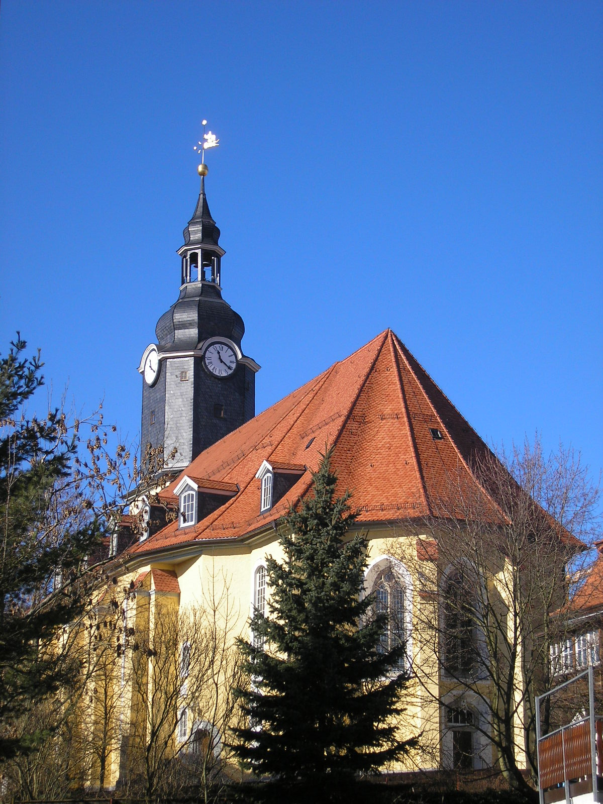 St. Jakobuskirche in Ilmenau (Thüringen), Rückansicht.